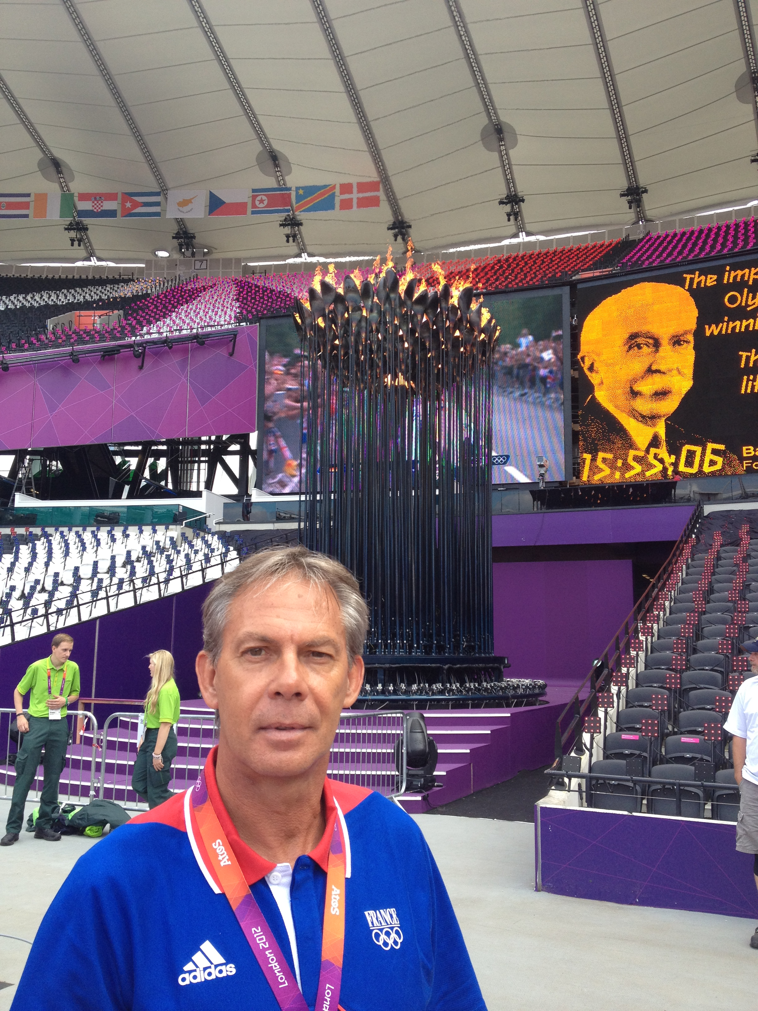 London 2012 - Philippe Dupont